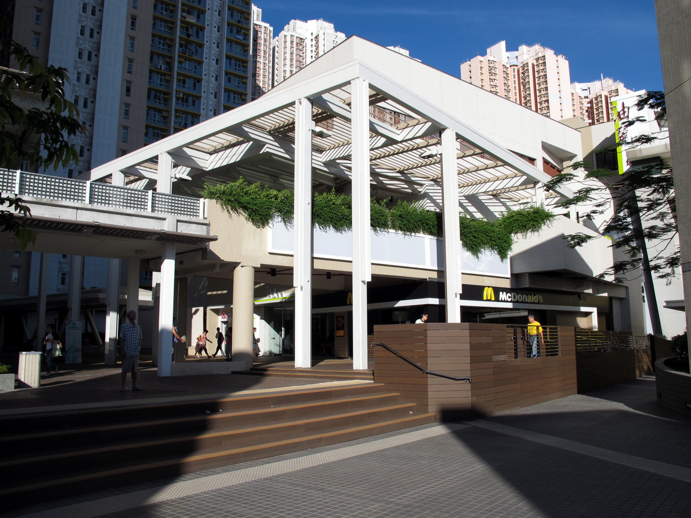 Yau Lai Shopping Centre 油麗商場